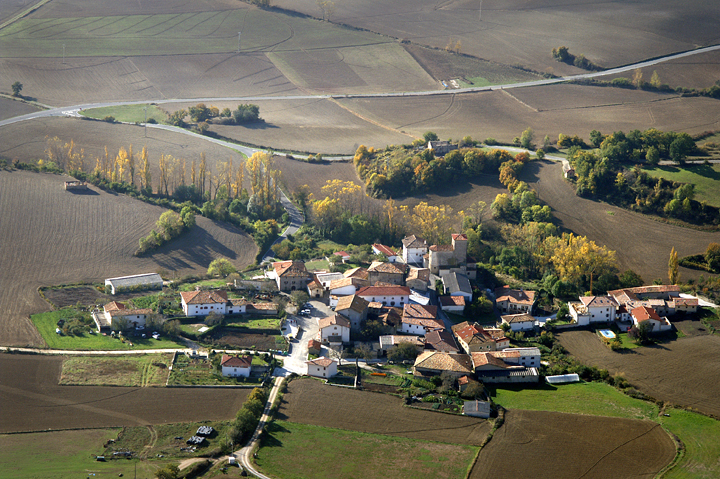 Olloko gotiko ikuspegia.